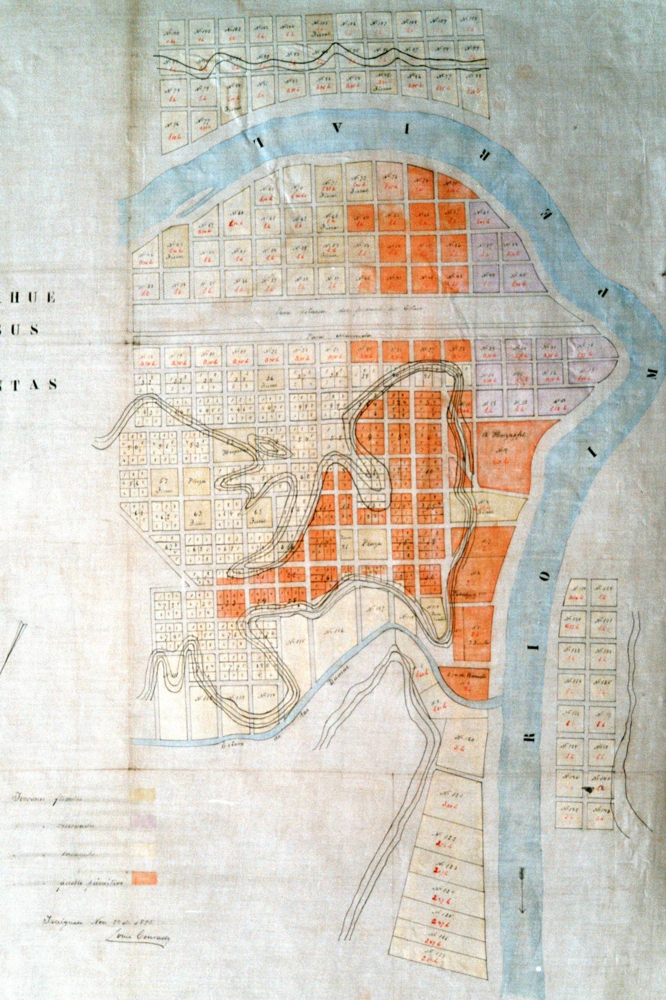 Mapa loteo de Carahue